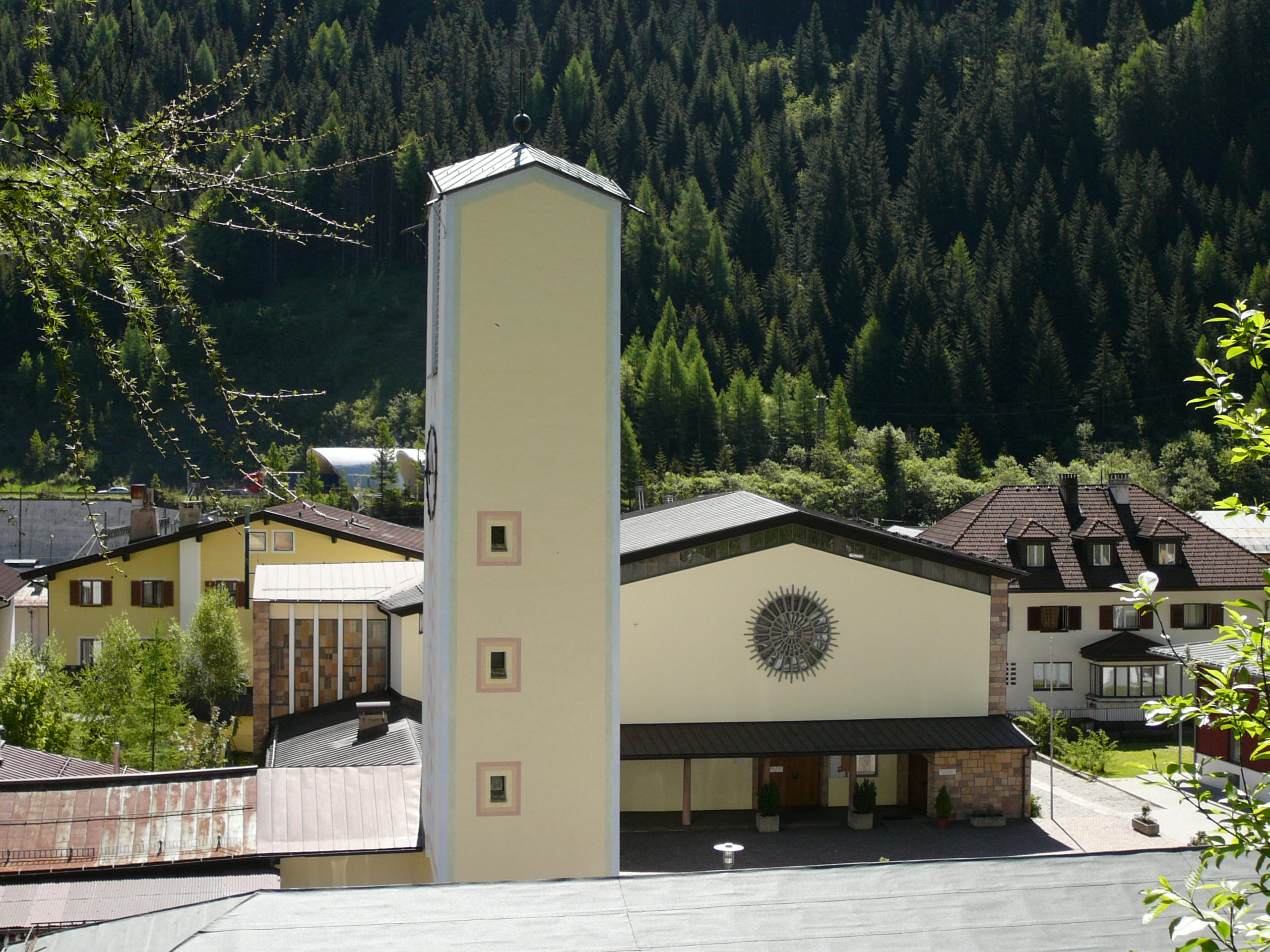 Parrocchia Santa Maria della Strada Brennero